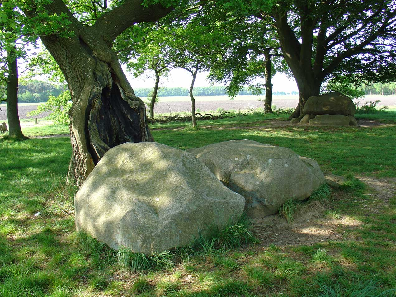 Hunebed D22 nabij Bronneger